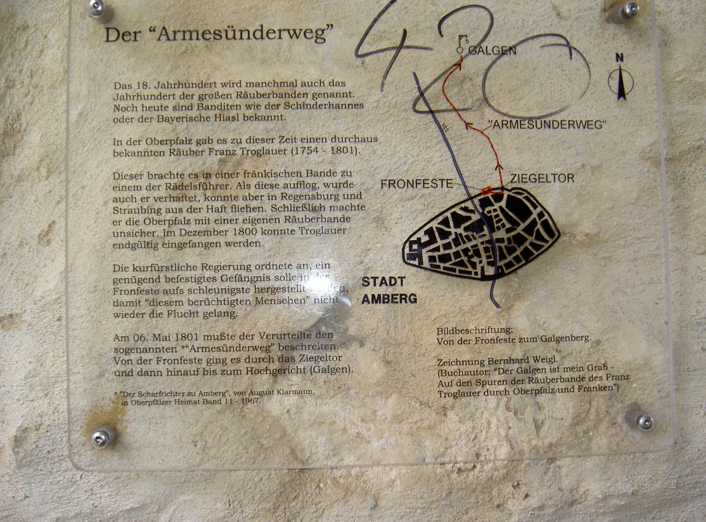 Amberg Fronfeste, ehemaliges Gefängnis, heute Hotel